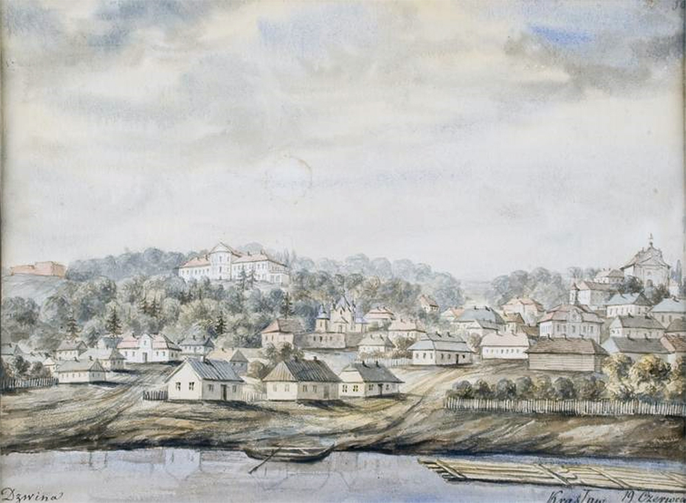 Беларуская (тарашкевіца): Краслаў (Krasłaŭ), з боку ракі Дзьвіны (Dźvina)